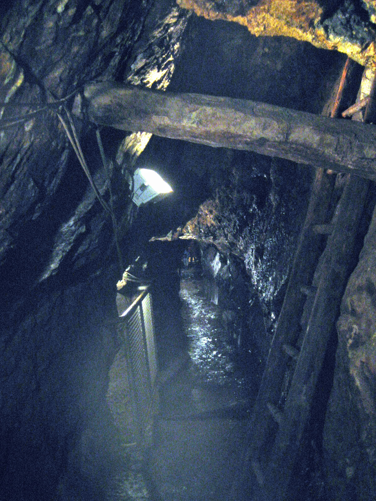 Koffergrouf bannenan.